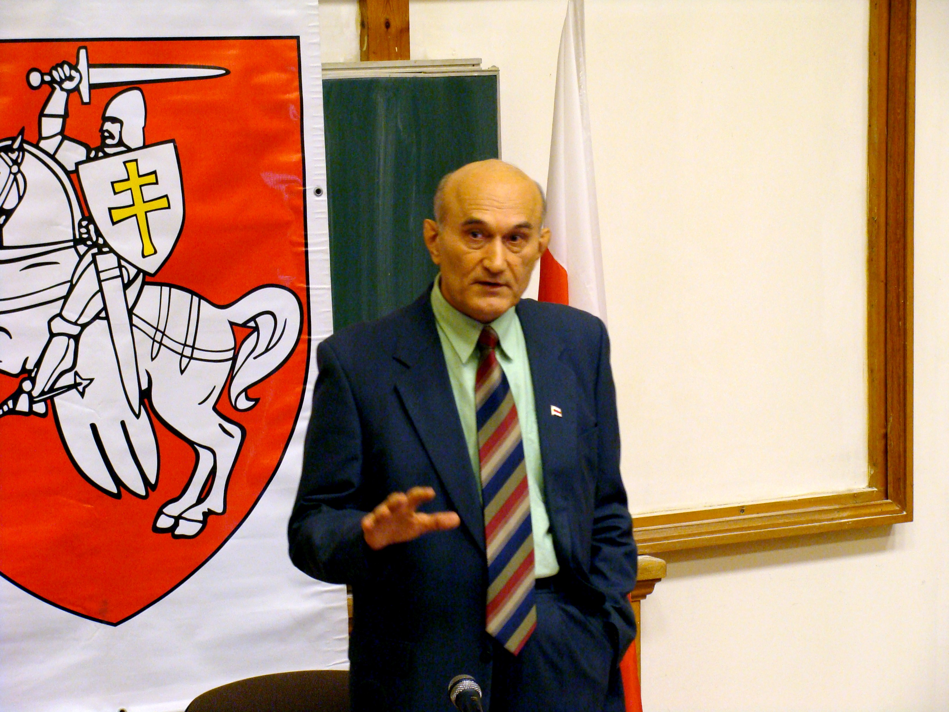 Zianon Pazniak prowadzi wykład na uniwersytecie Collegium Civitas w Warszawie.